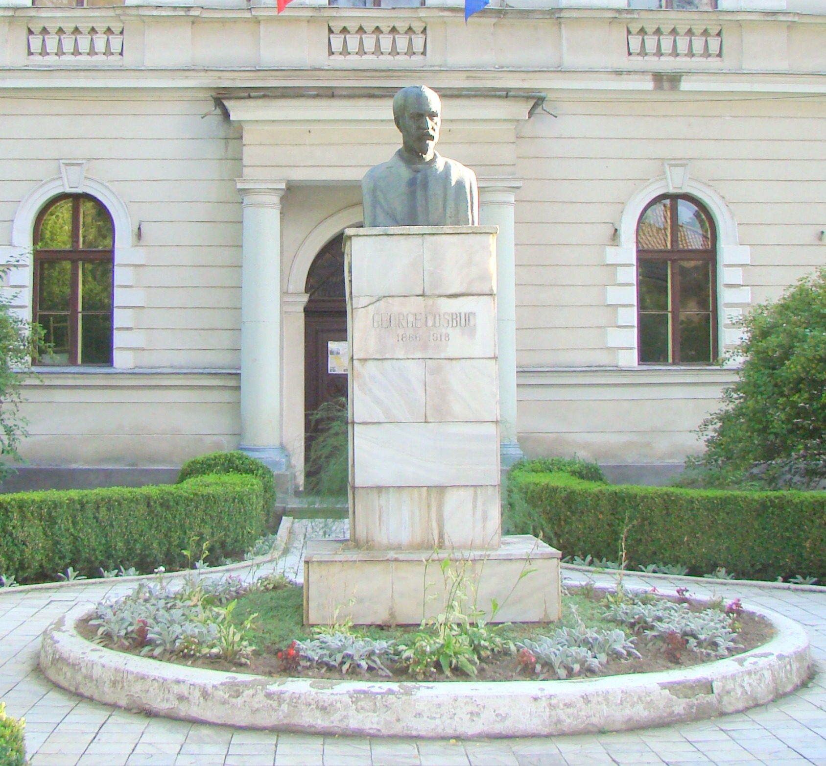 Bustul lui George Coșbuc, autor Corneliu Medrea, oraș Năsăud, Bd. Grănicerilor 2